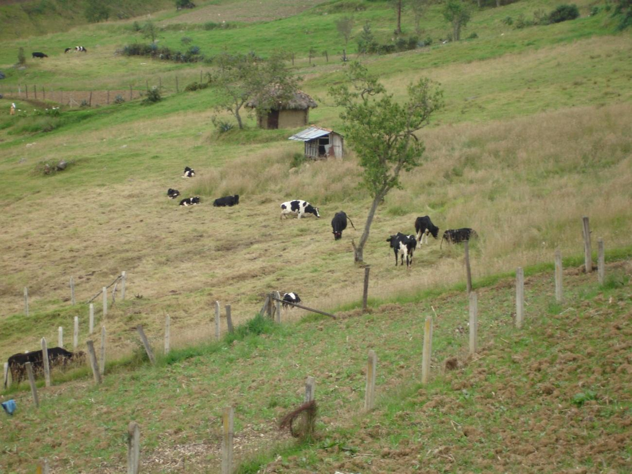 Ganaderia en la parroquia de Cumbe